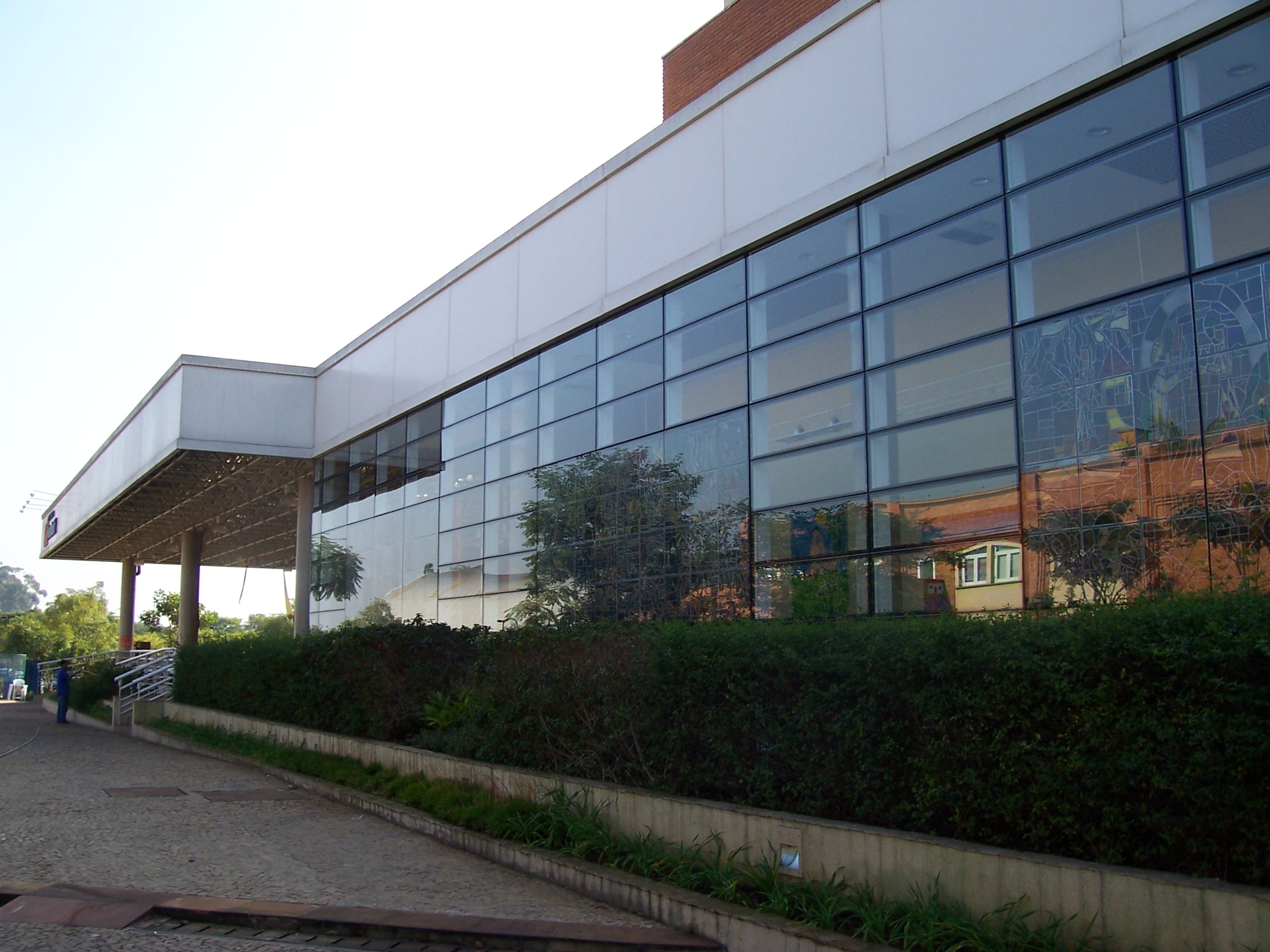 Uma foto da faxada do teatro do Colégio Humboldt.